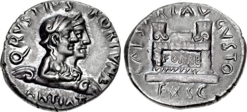 Augustus (27 BC - AD 14) AR Denarius, Rome mint, Q. Rustius, Struck 19 BC.Q • RVSTIVS FORTVNÆ above, ΛNTIΛT in exergue, jugate, draped busts right of Fortuna Victrix, wearing round helmet, holding patera in right hand, and Fortuna Felix, wearing stephane; both busts rest on bar terminating at each end in a ram’s headCΛESΛRI ΛV GVSTO, EX S C in exergue, ornamented rectangular altar inscribed FOR • RE set on base. RIC I 322; RSC 513; BMCRE 2-4 = BMCRR Rome 4580-2; BN 221-8. Near EF, deep cabinet tone. Well centered and struck.